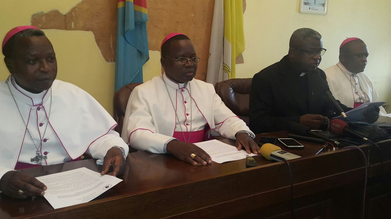 L’abbé Donatien Nshole, secrétaire général adjoint de la Cenco (Conférence nationale épiscopale du Congo), au centre en noir, lors d’un point de presse à Kinshasa, le 2 décembre 2016. (VOA/Top Congo FM)De gauche à droite, Mgr ?, Mgr Marcel Utembi Tapa (source), Abbé Donatien Nshole, Mgr Fridolin Ambongo (?).